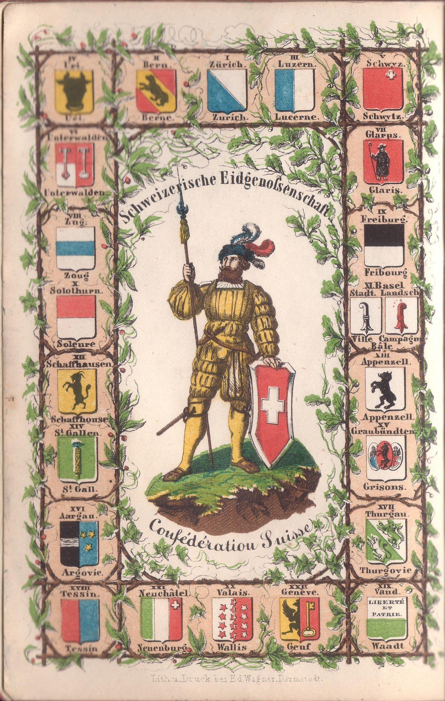 Baedeker Suisse, 1863, Wappentafel